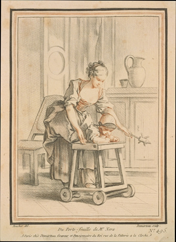 "Du porte-feuille de Mr. Néra" by French engraver Gilles Demarteau (1729-1776) after François Boucher (1703-1770). Crayon manner print.